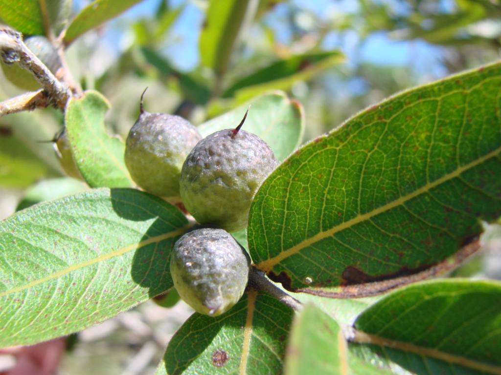 Callisthene major - VOCHYSIACEAE Parque Nacional da Chapada dos Veadeiros - Cavalcante - Goiás - Brasil.